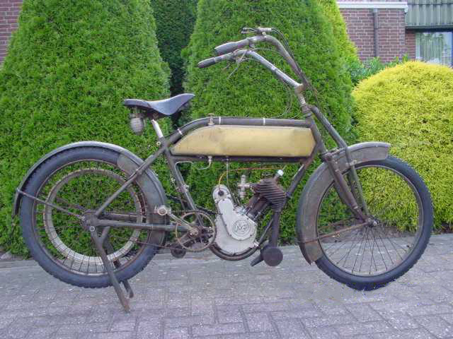 Toestemming van Yesterdays Antique Motorcycles (